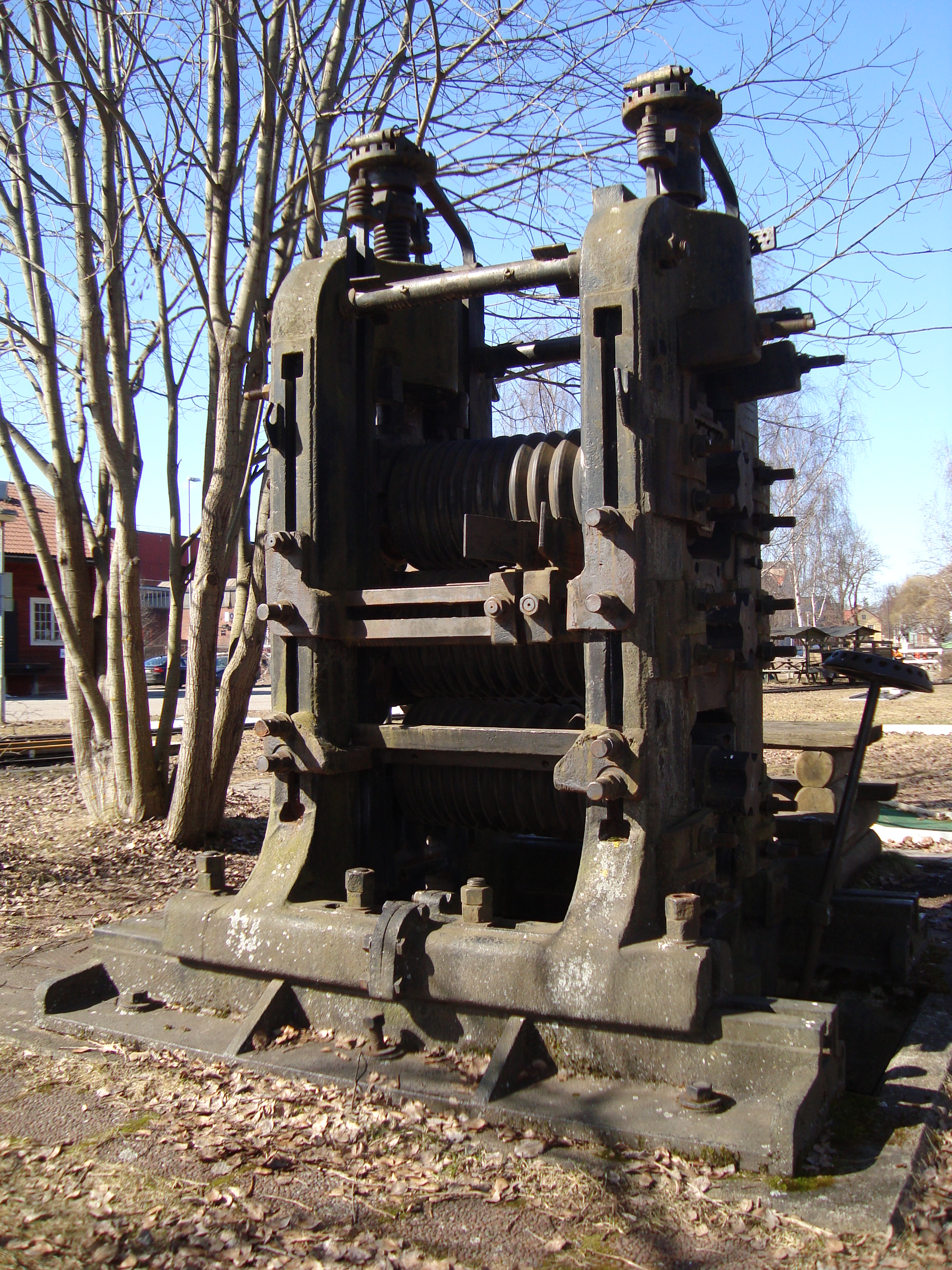 Valsstolpar från Smedjebackens valsverk. Skänkta till kommunen av Smedjebackens Valsverks AB och Lions Club 29 maj 1982.